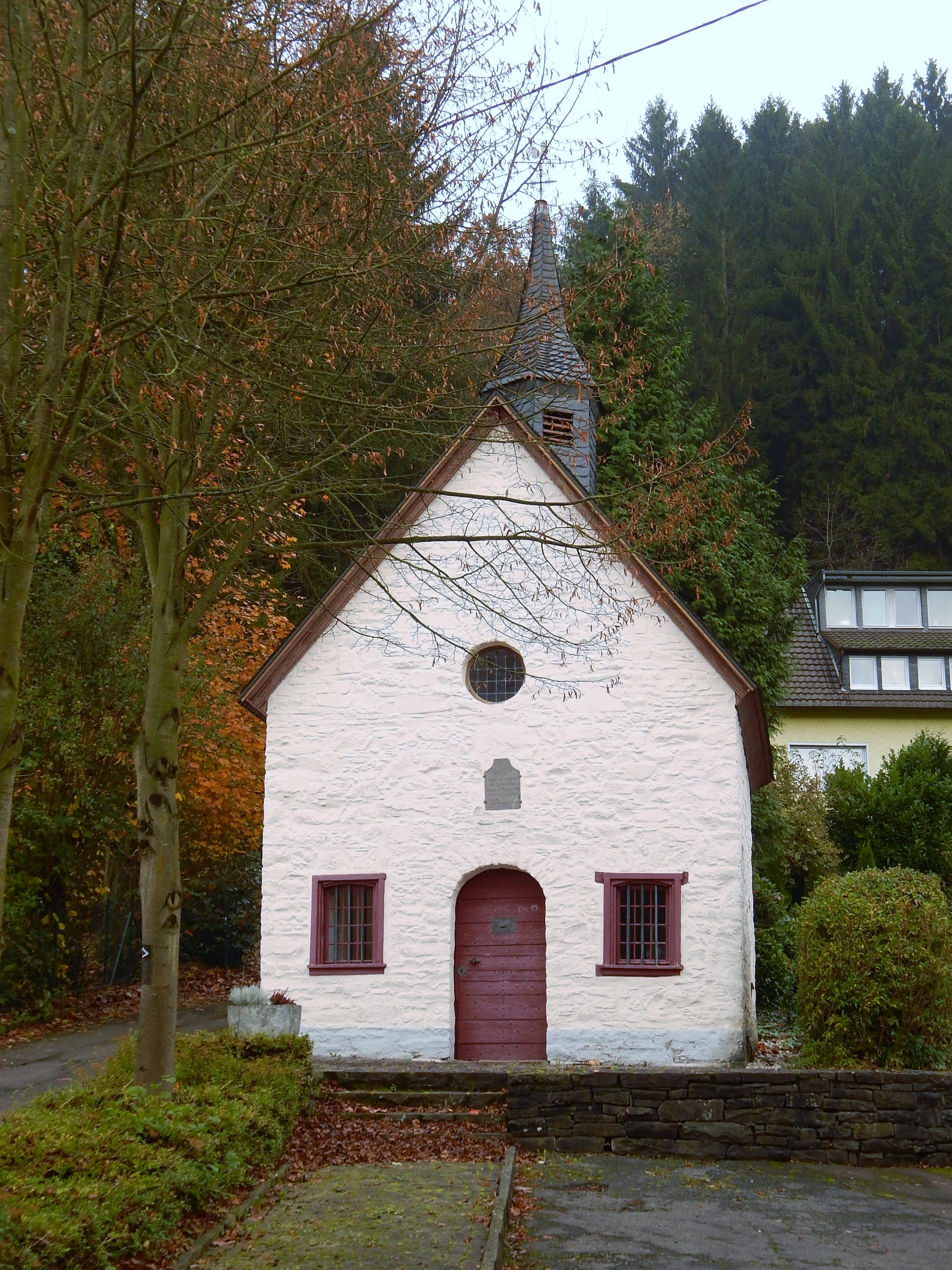 Sankt Rochus Kapelle in Engelskirchen-Loope